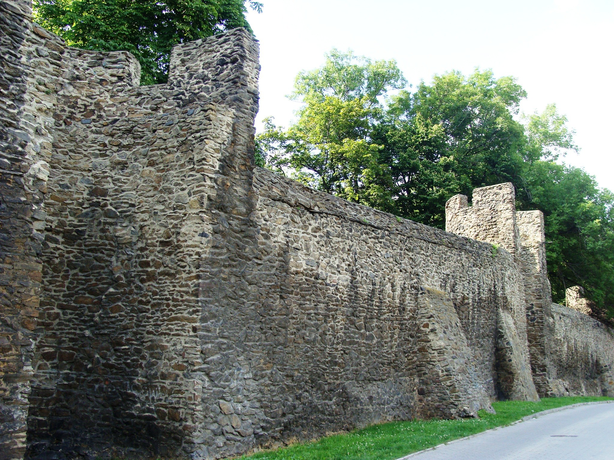 Dzierżoniów, mury obronne